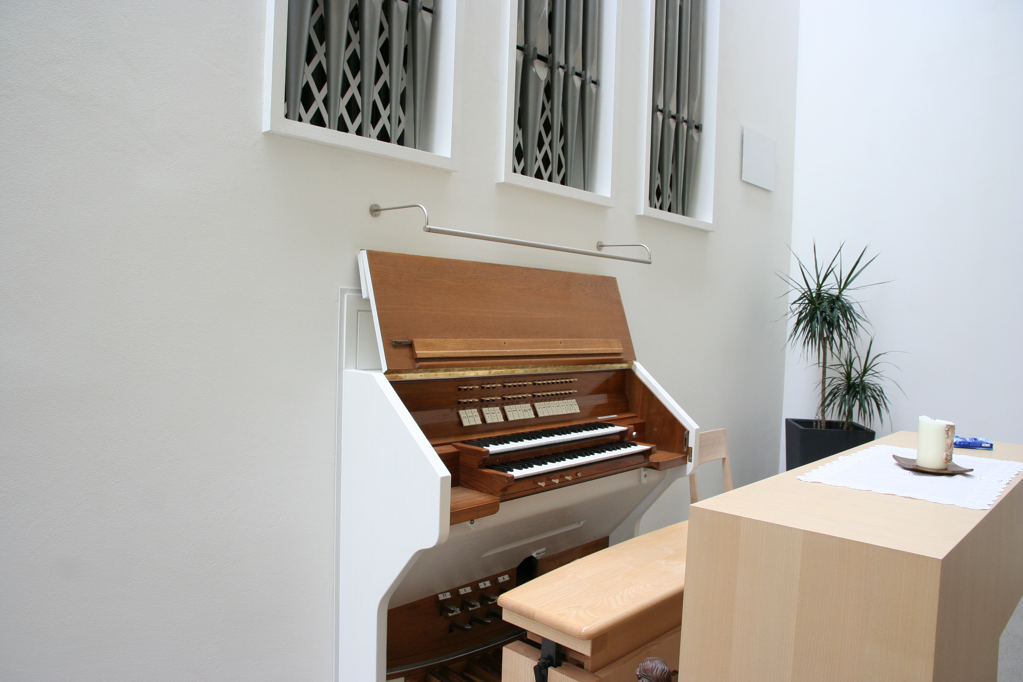 Römisch-katholische Kirche St. Marien Richterswil-Samstagern, Spieltisch